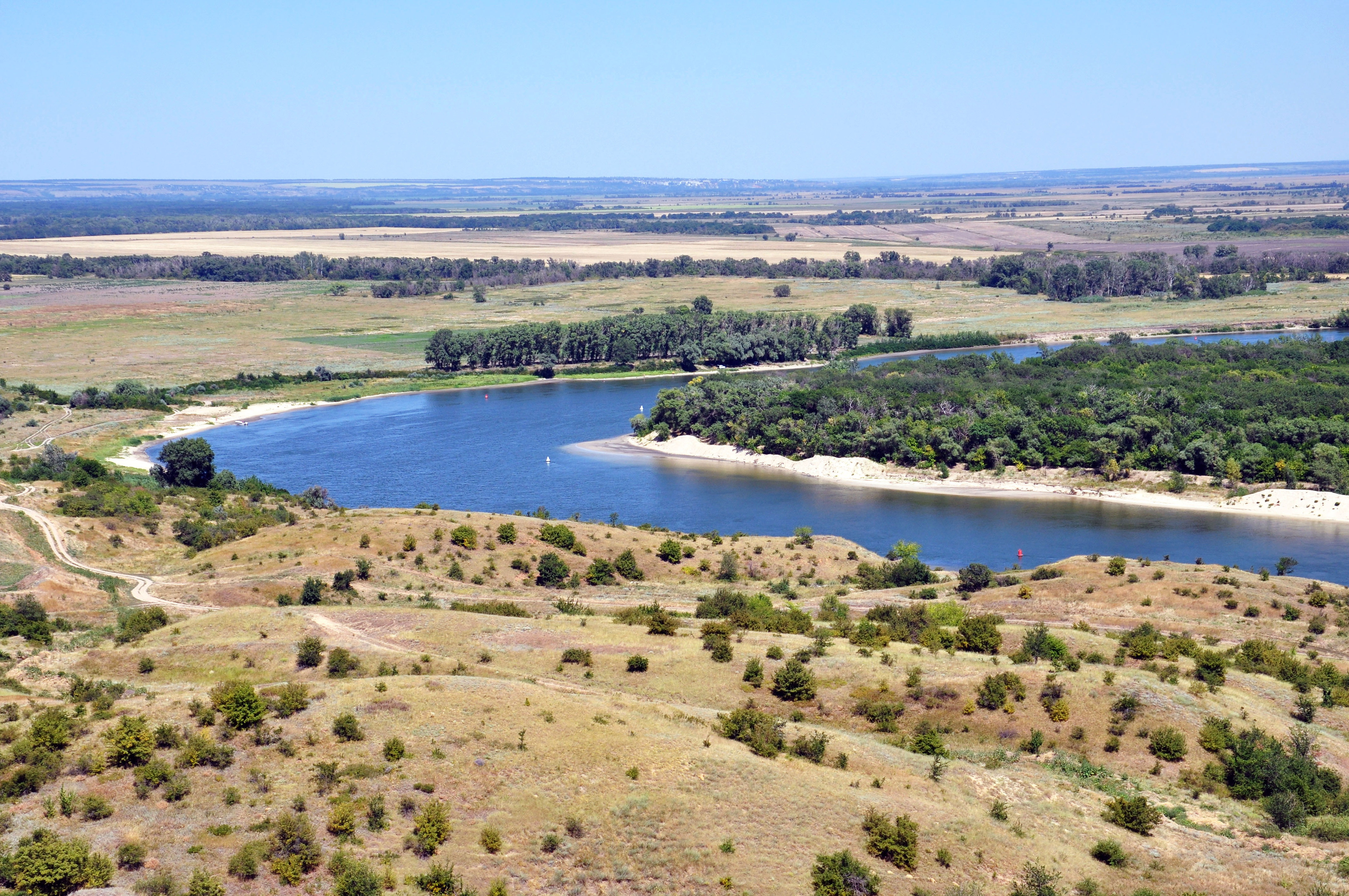 Раздорские склоны: Усть-Донецкий район, Ростовская область This image is related to the protected area of Russia number 6110164